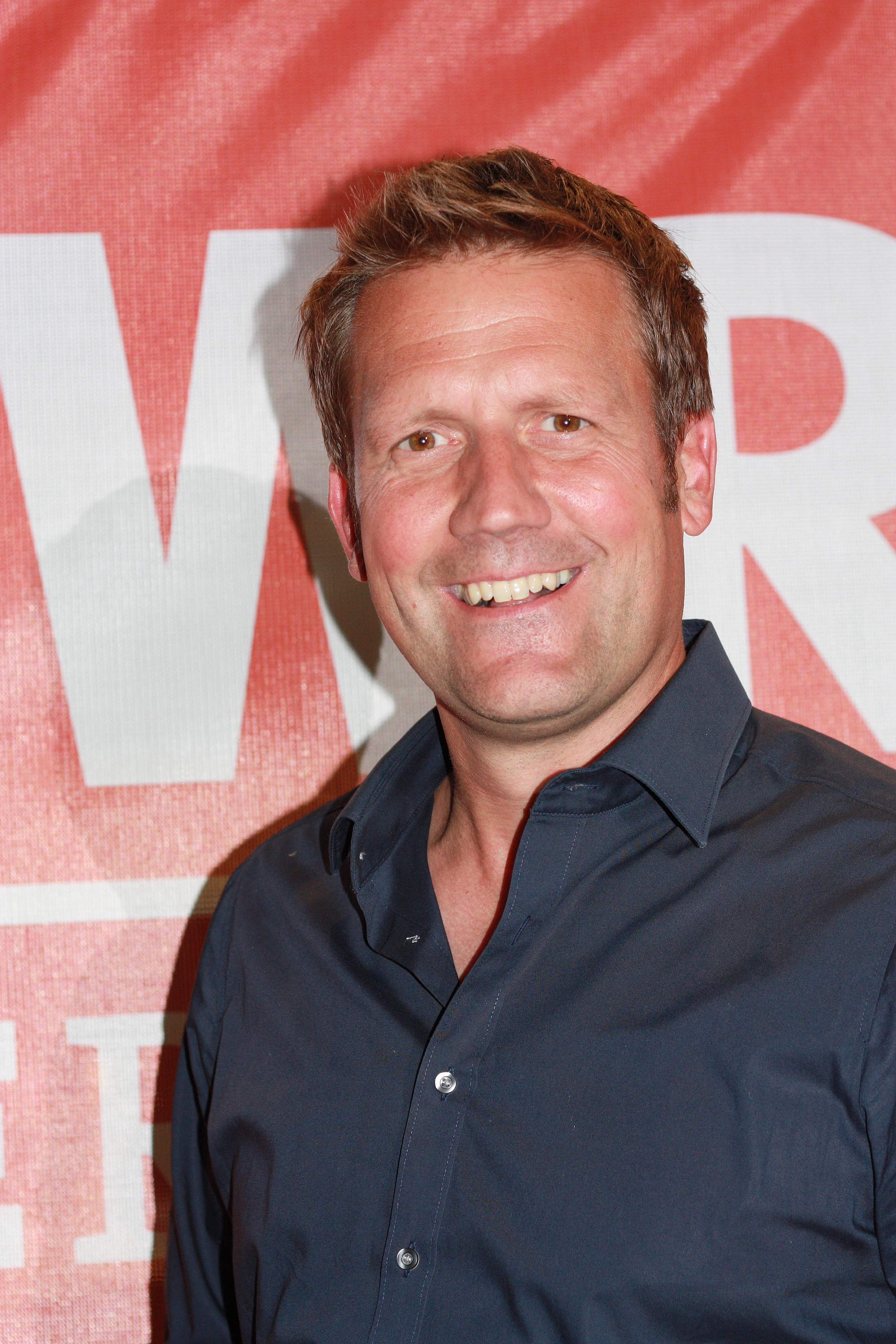 Jens Hübschen moderierte beim SWR Sommerfestival 2016 in Mainz die Open Air Tatort-Premiere HAL am 8. Juli 2016. Das Foto entstand bei der anschließenden Autogrammstunde mit den beiden Tatortkommissaren Richy Müller und Felix Klare. IMG 7818